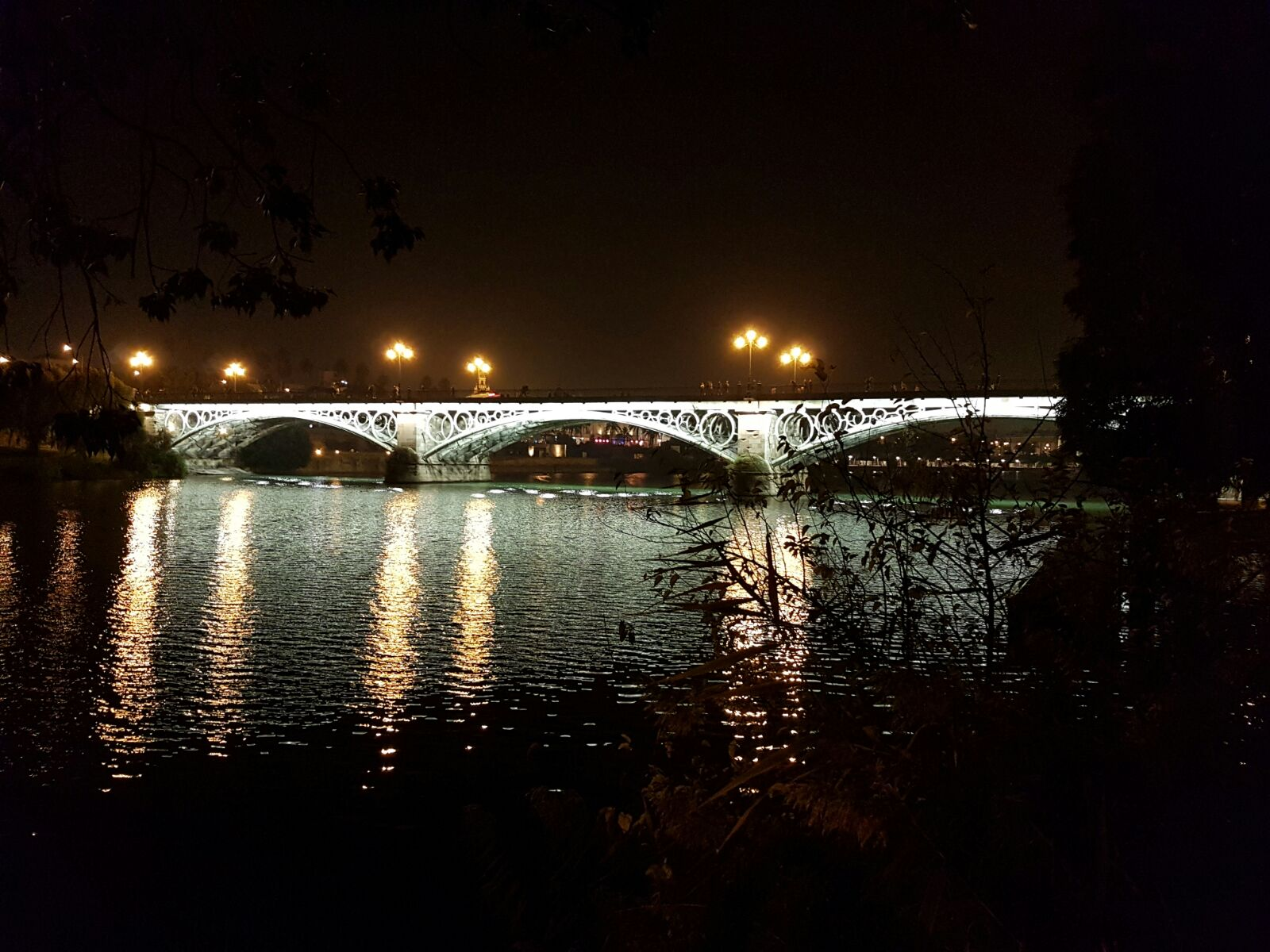 Puente sobre el río Guadalquivir, Sevilla, España.